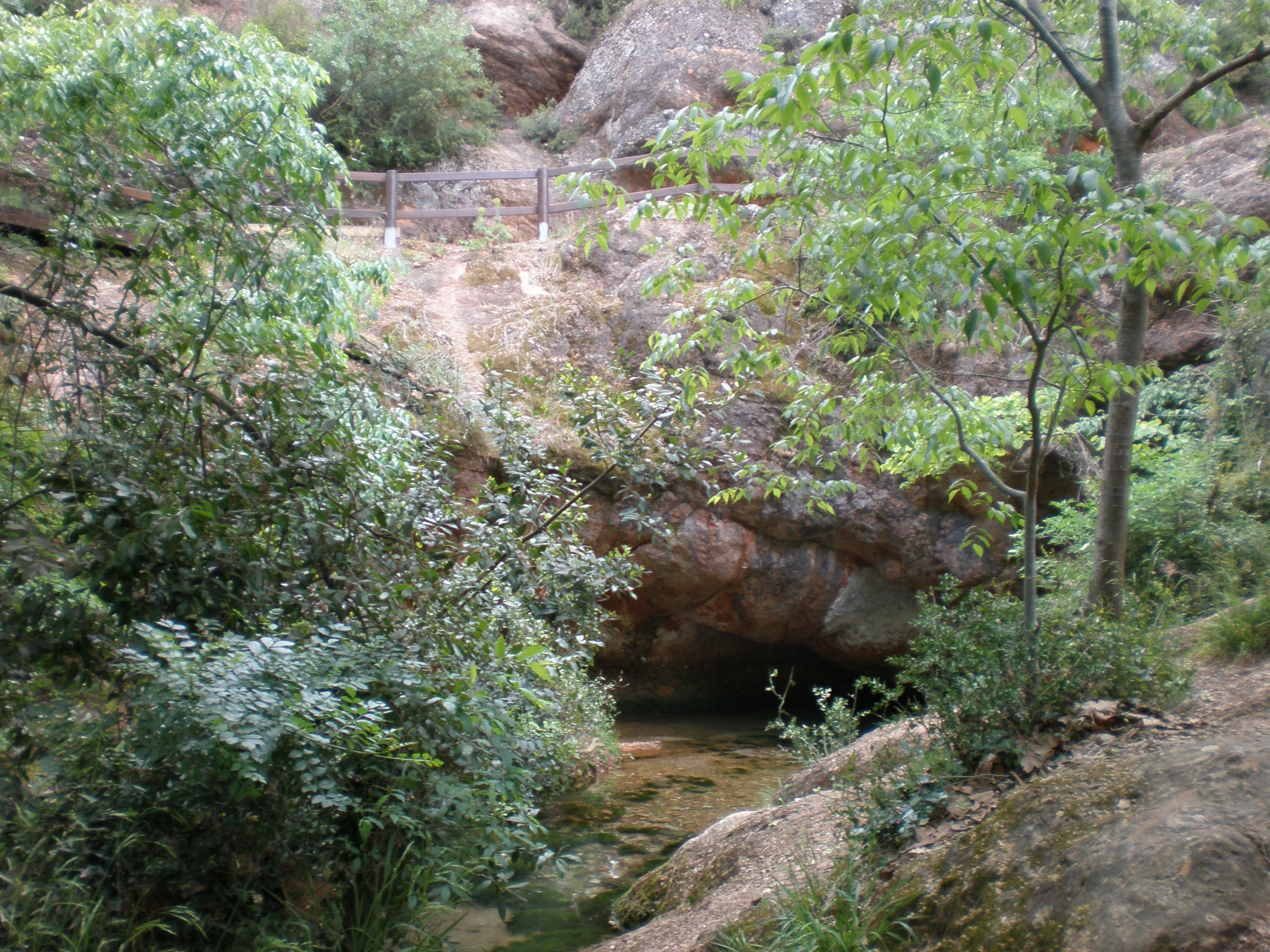 La source de l'Avy à Grabels (Hérault)